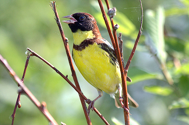 Сарыторғай түрі